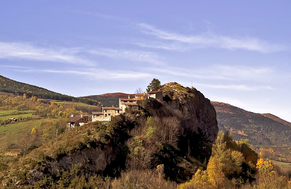 La Roca, pueblecito situado entre Camprodón y Setcases, en la comarca Gerundense del Ripolles.